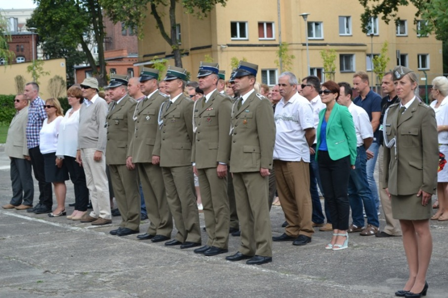 15 WOG ze Szczecina podczas uroczystej zbiorki z okazji święta WP w 2014r.